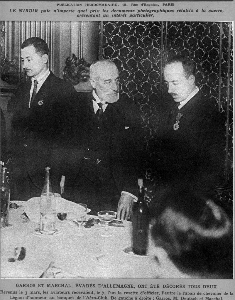 Le Miroir N°225 couv - Garros et Marchal, évadés d'Allemagne, ont été décorés tous deux. Revenus le 3 mars, les aviateurs recevaient, le 7, l'un la rosette d'officier, l'autre le ruban de chevalier de la Légion d'honneur au banquet de l'Aéro-Club. De gauche à droite: Roland Garros, Henry Deutsch de la Meurthe, et Anselme Marchal.